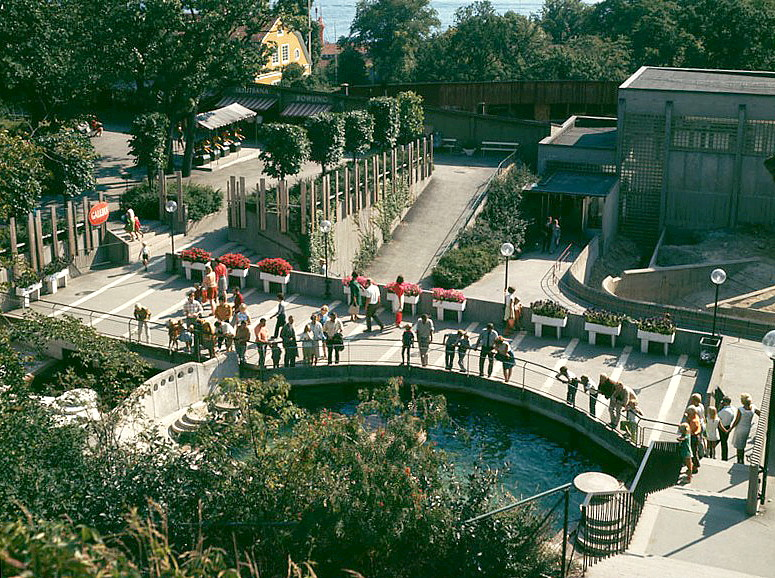 Elefanthuset på Skansen, ritat av Holger Blom.